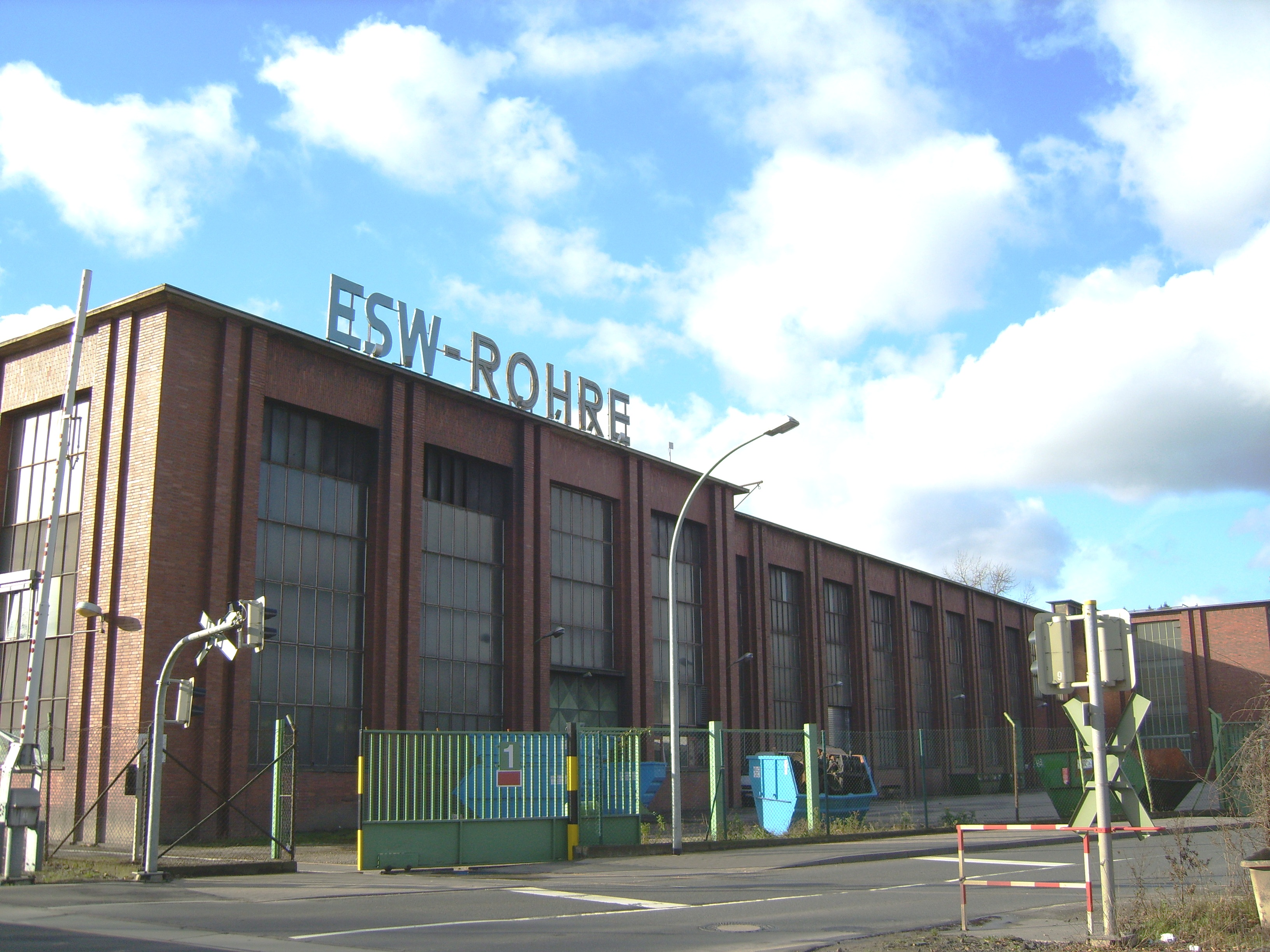 Werk "ESW-Rohre" in Eschweiler-Aue in der Städteregion Aachen in Nordrhein-Westfalen